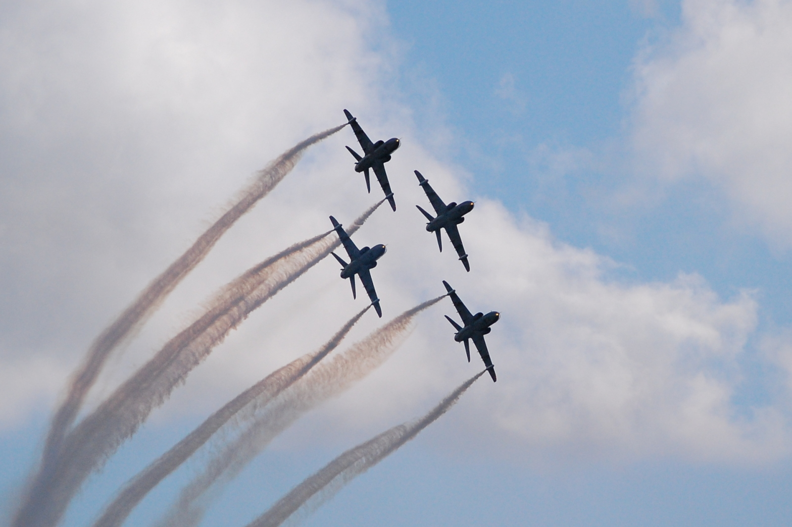 Grupa akrobacyjna Midnight Hawks Fińskich Sił Powietrznych podczas Air Show 2009 w Radomiu.